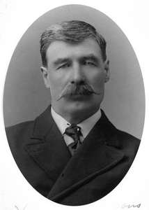 Onésime Tremblay (1856-1947) à 50 ans